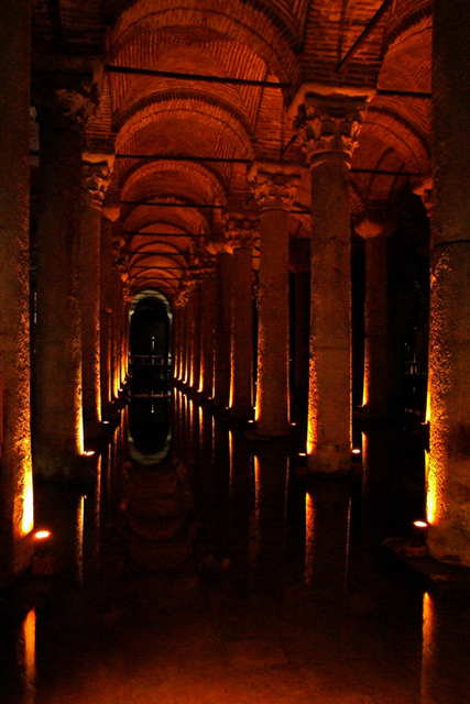 Yerebatan Sarnici